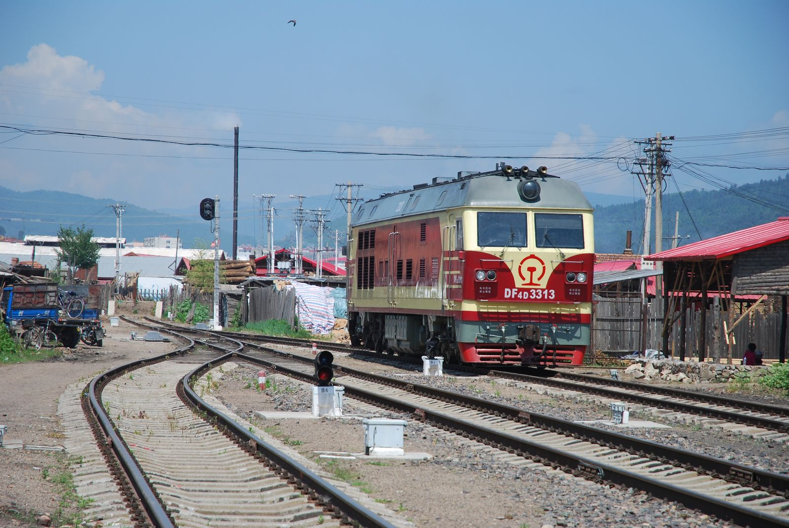 火龙沟线在长汀镇站的尽头